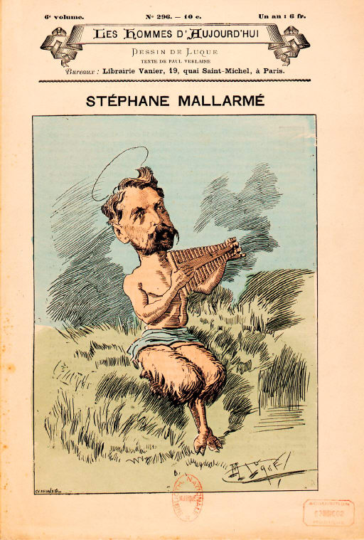 Stéphane Mallarmé as Pan. Published in Les hommes d'aujourd'hui, 1887.